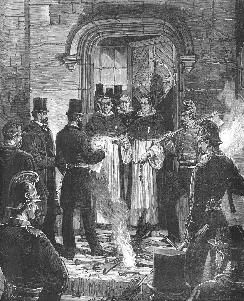 "L'exécution des décrets à Paris. 5 novembre [1880]. Chez les Dominicains de la rue Jean-de-Beauvais. Lecture de la notification des décrets aux R.P. Mercié, Jouin et Bernard. Dessin de M. de Haenen d'après le croquis de M. Dick".